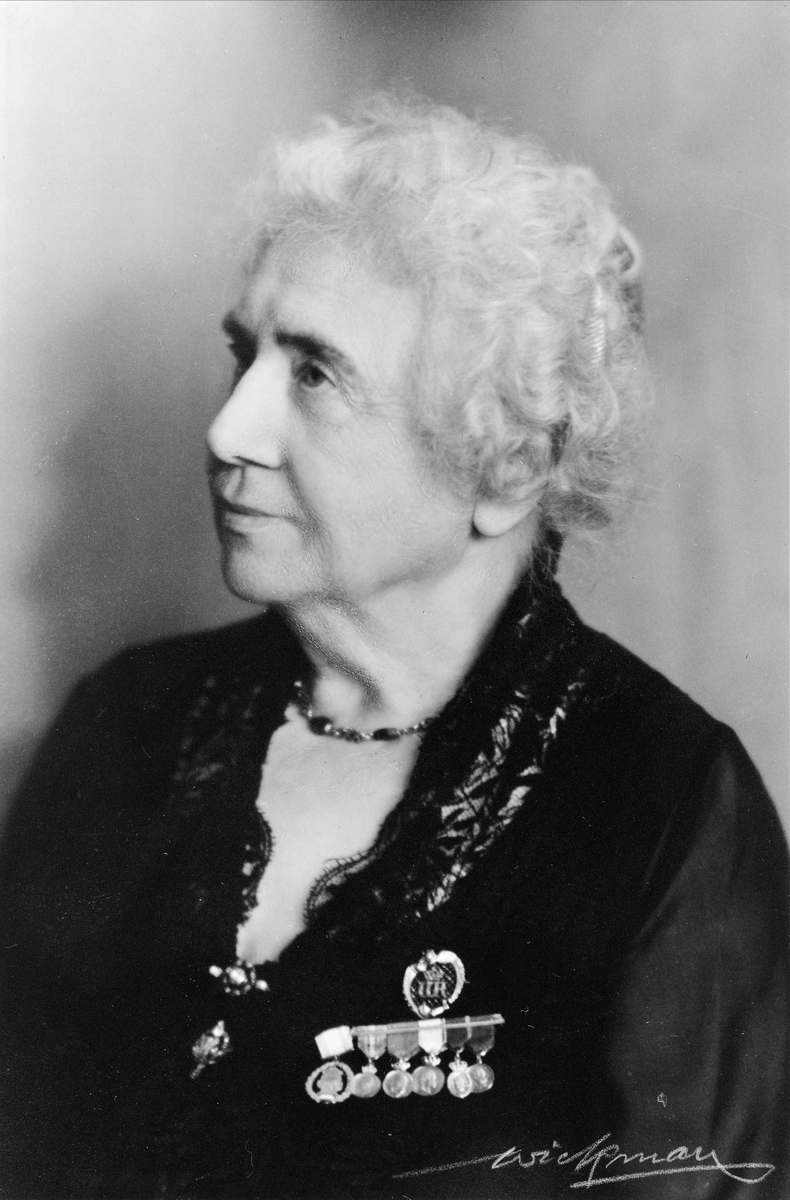 Den norske operasangerinnen Ellen Gulbranson (1863-1947).